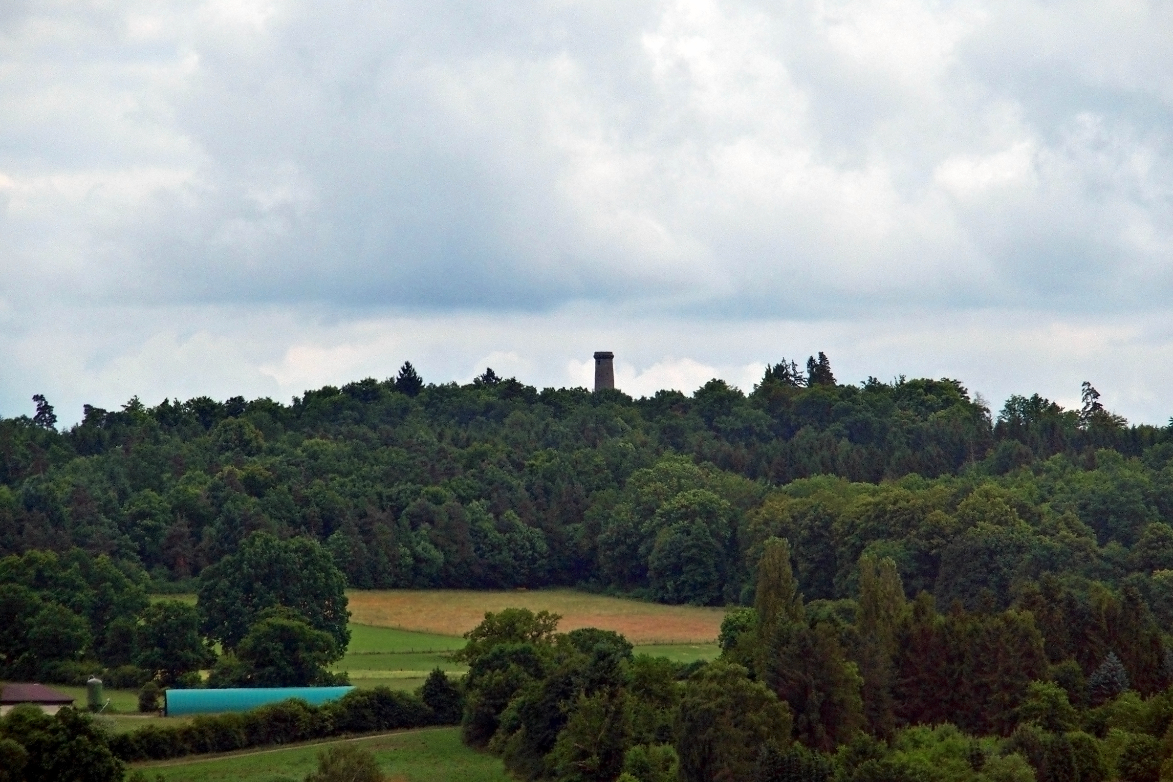 Waldgebiet am Hainig in Lauterbach